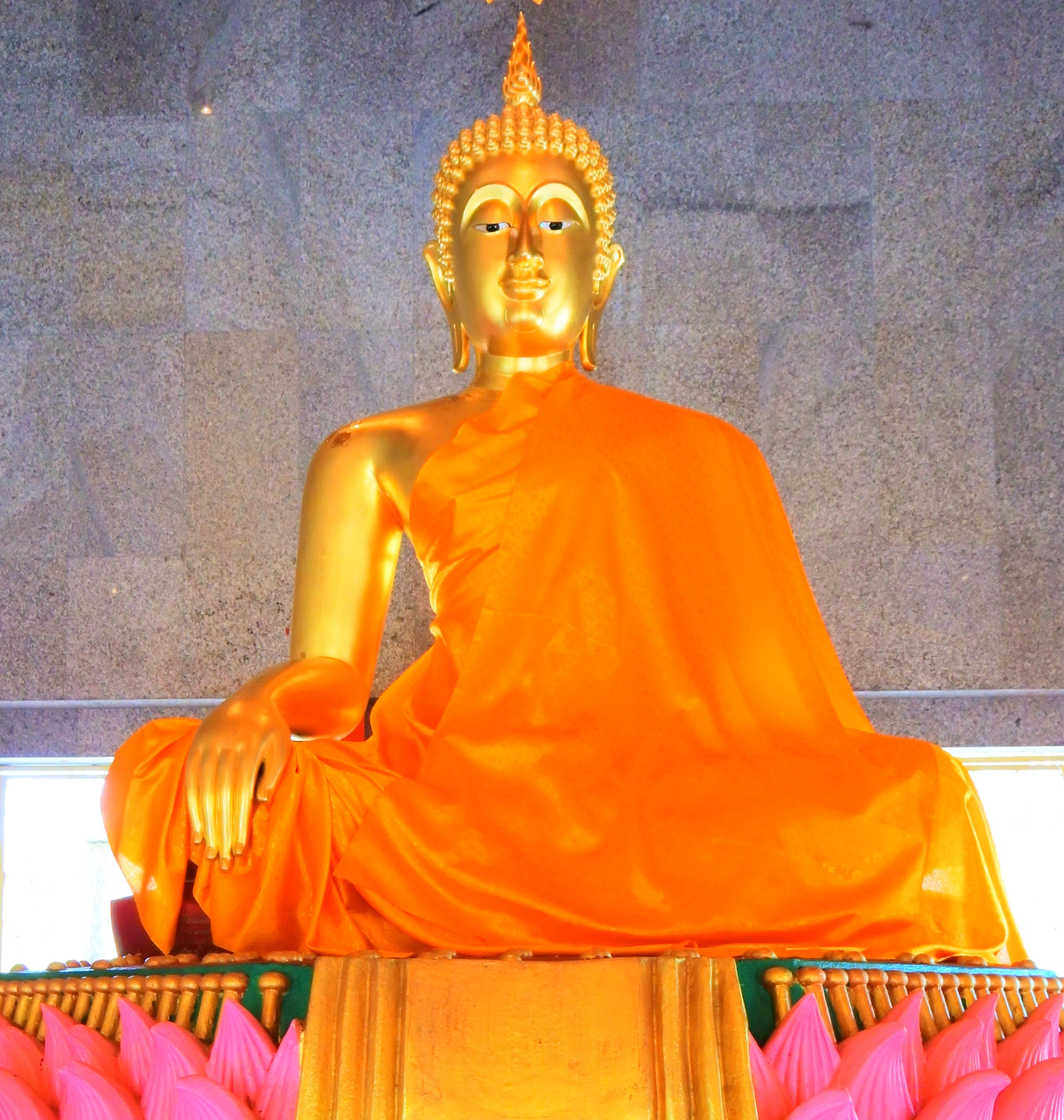 พระประธานในอุโบสถ